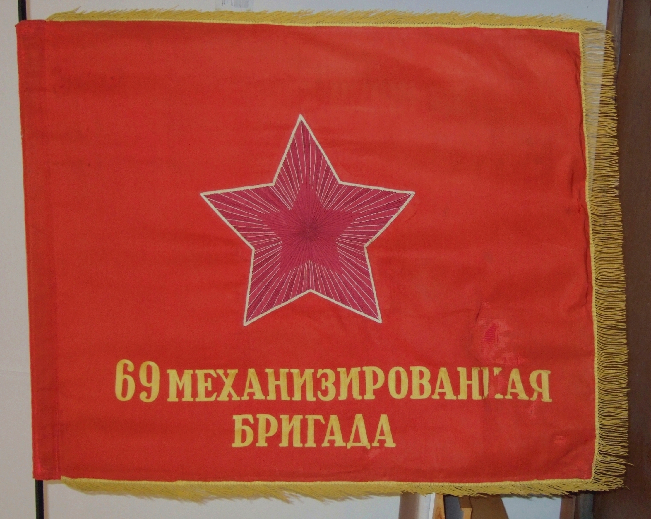 Боевое Знамя 69 механизированной бригады Красной Армии времён Великой Отечественной Войны, Аверс, фото сделано в Знамённом Фонде Центрального музея ВС